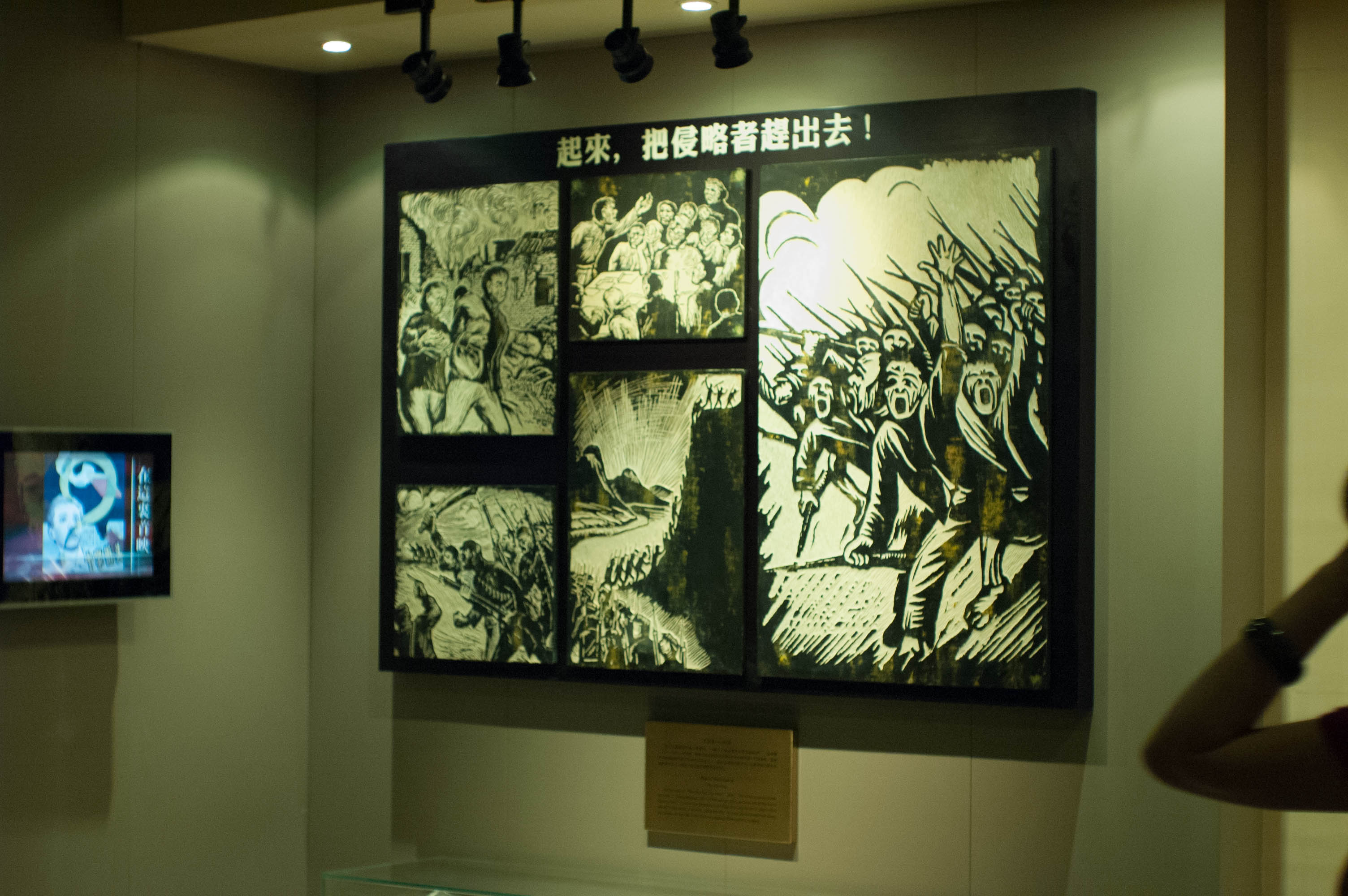 中文（中国大陆）: 国歌展示馆-“起来，把侵略者赶出去”